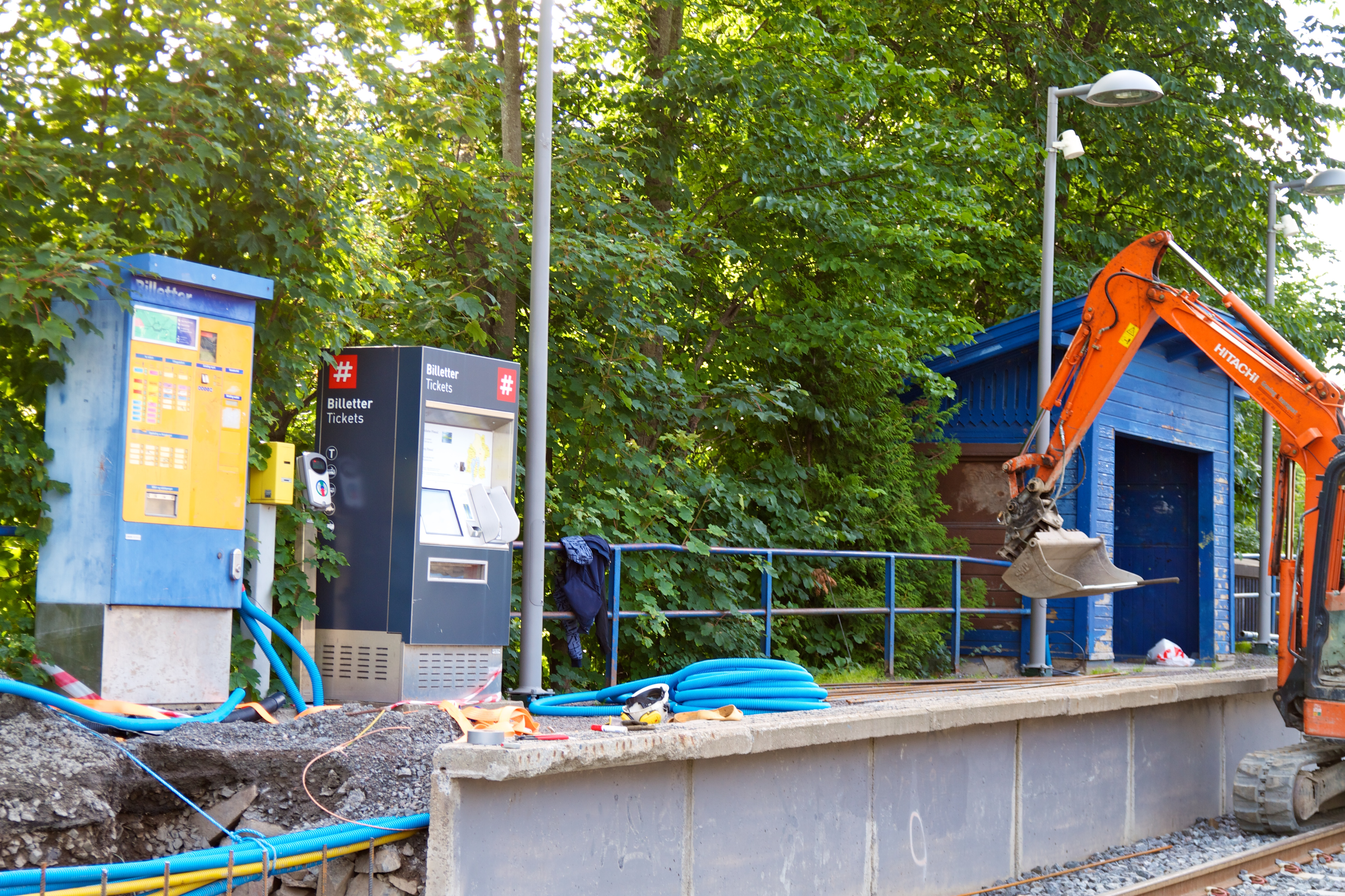 Frøen stasjon på Holmenkollbanen.